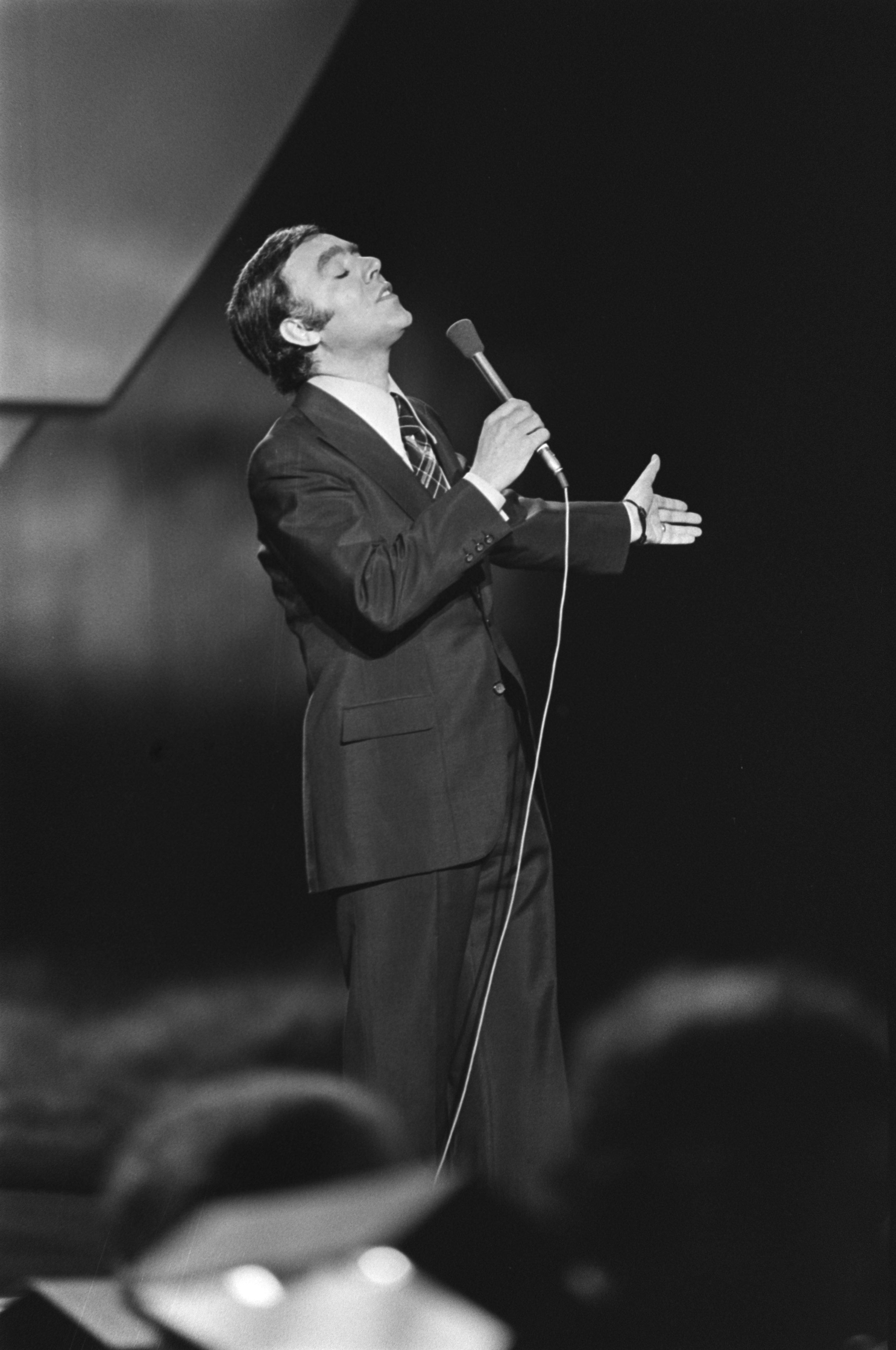 Collectie / Archief : Fotocollectie Anefo Reportage / Serie : [ onbekend ] Beschrijving : Eurovisie Songfestival 76 Den Haag ; Carlos de Carmo (Portugal) Datum : 3 april 1976 Locatie : Den Haag, Portugal Trefwoorden : songfestivals Persoonsnaam : Eurovisie Songfestival Fotograaf : Mieremet, Rob / Anefo Auteursrechthebbende : Nationaal Archief Materiaalsoort : Negatief (zwart/wit) Nummer archiefinventaris : bekijk toegang 2.24.01.05 Bestanddeelnummer : 928-5019